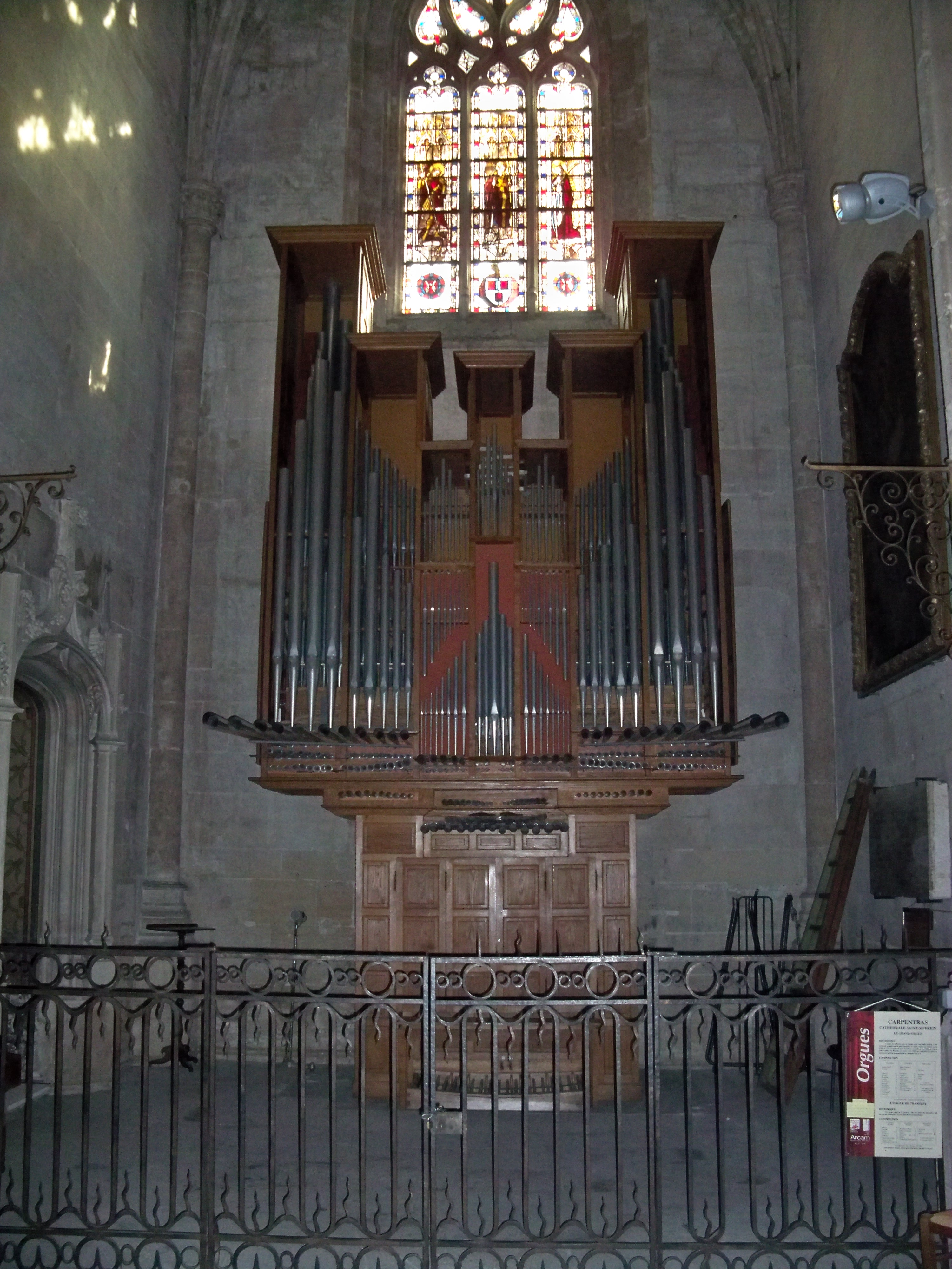 Orgue de la Cathédrale de Saint Siffrein de Carpentras (84)